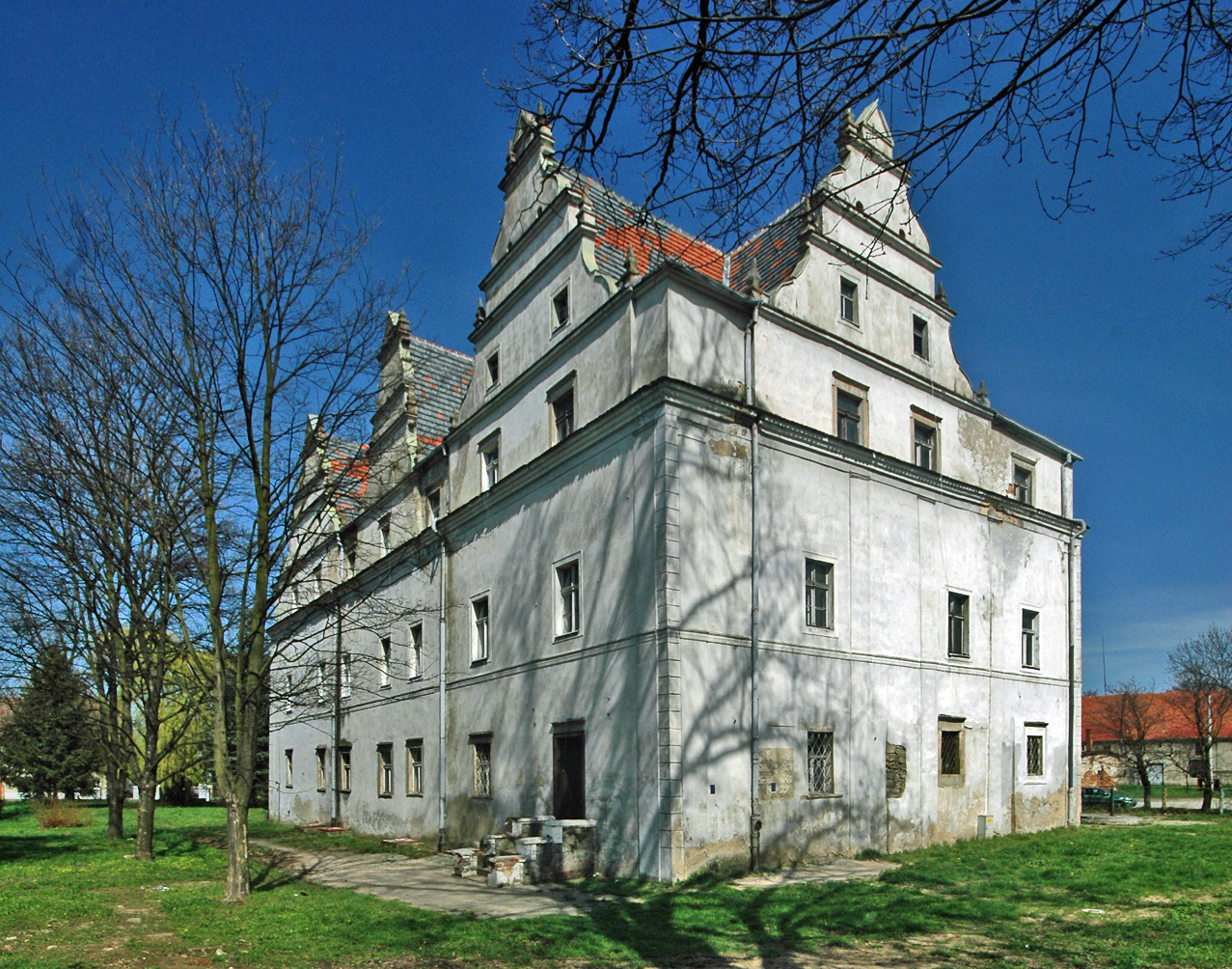 Wilków Wielki - dwór (zabytek nr 466)